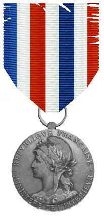 Eremedaille van de Parijse Markten 1900 - 1945